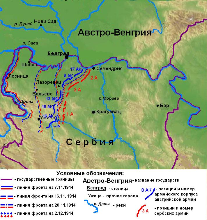 Положение на сербском фронте перед контрнаступлением сербских войск.